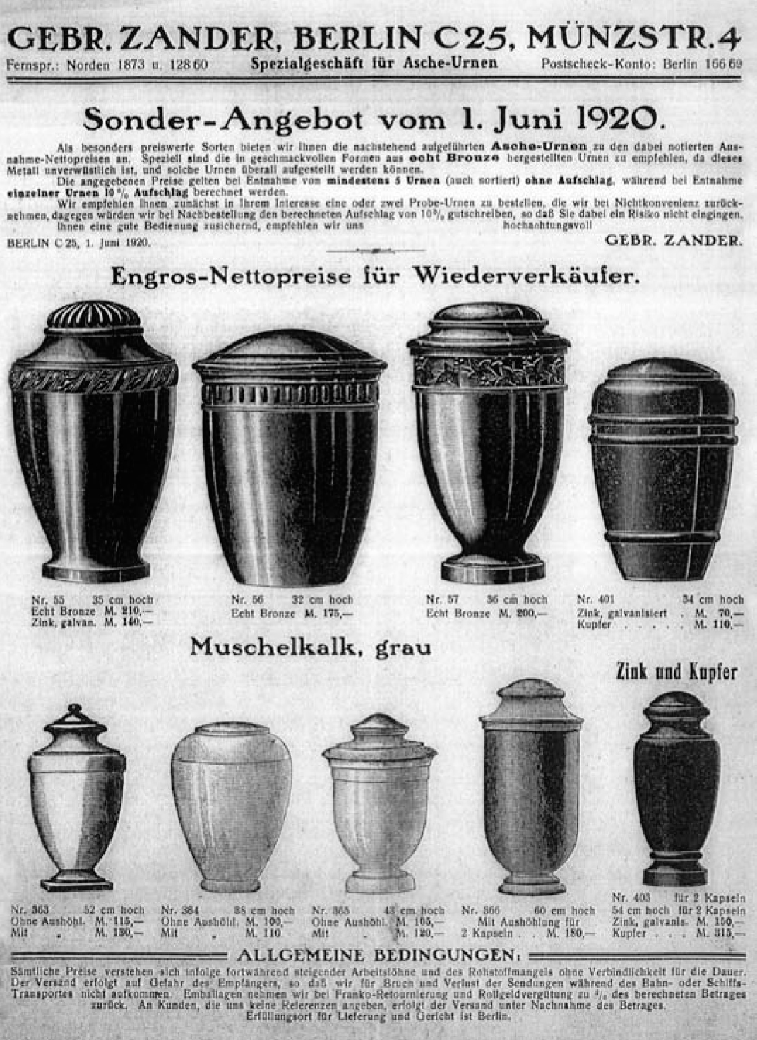 Werksarchiv, Willibald Völsing KG